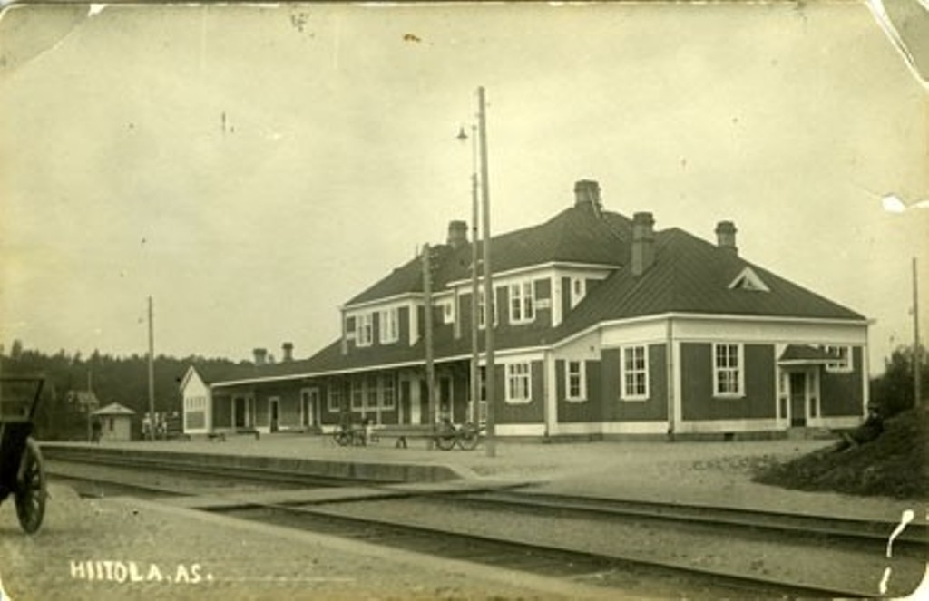 Хийтола 3